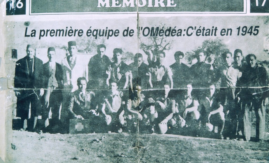 Première équipe de l'Olymique de Médéa (1945) : Premier rang et de gauche à droite : 1 - SEKAKEN Abdelkader dit " El Antri \" 2 - EL MOHRI Abderrahmane 3 - BENTEGHRI El Hadj dit \" Panagré \" 4 - FERGANI Abdelkader dit \" Benmalek \" 5 - BOUCHNAFA Mohamed 6 - MOKHBAT Mustapha Debout et de gauche à droite : 1 - BENSAID Getthen ( supporter ) 2 - HAMOUDI Hamouda ( supporter ) 3 - OUALI Mustapha ( Président ) 4 - Non identifié 5 - BELHADJ Djilali 6 - LAMOURI Mohamed 7 - ENFOUSSI Noureddine 8 - TAIR Mohamed 9 - TCHIKOU Mohamed 10 - BENKHALED Mohamed dit \" BERBA \" 11 - OULD RAMOUL Abdelkader 12 - HADJERSI Abdelkader